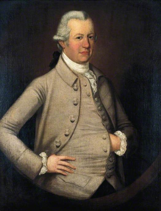 Porträt des Samuel Fludyer, 1. Baronet (1704-1768), merchant banker, member of parliament und 1761 Lord Mayor of London